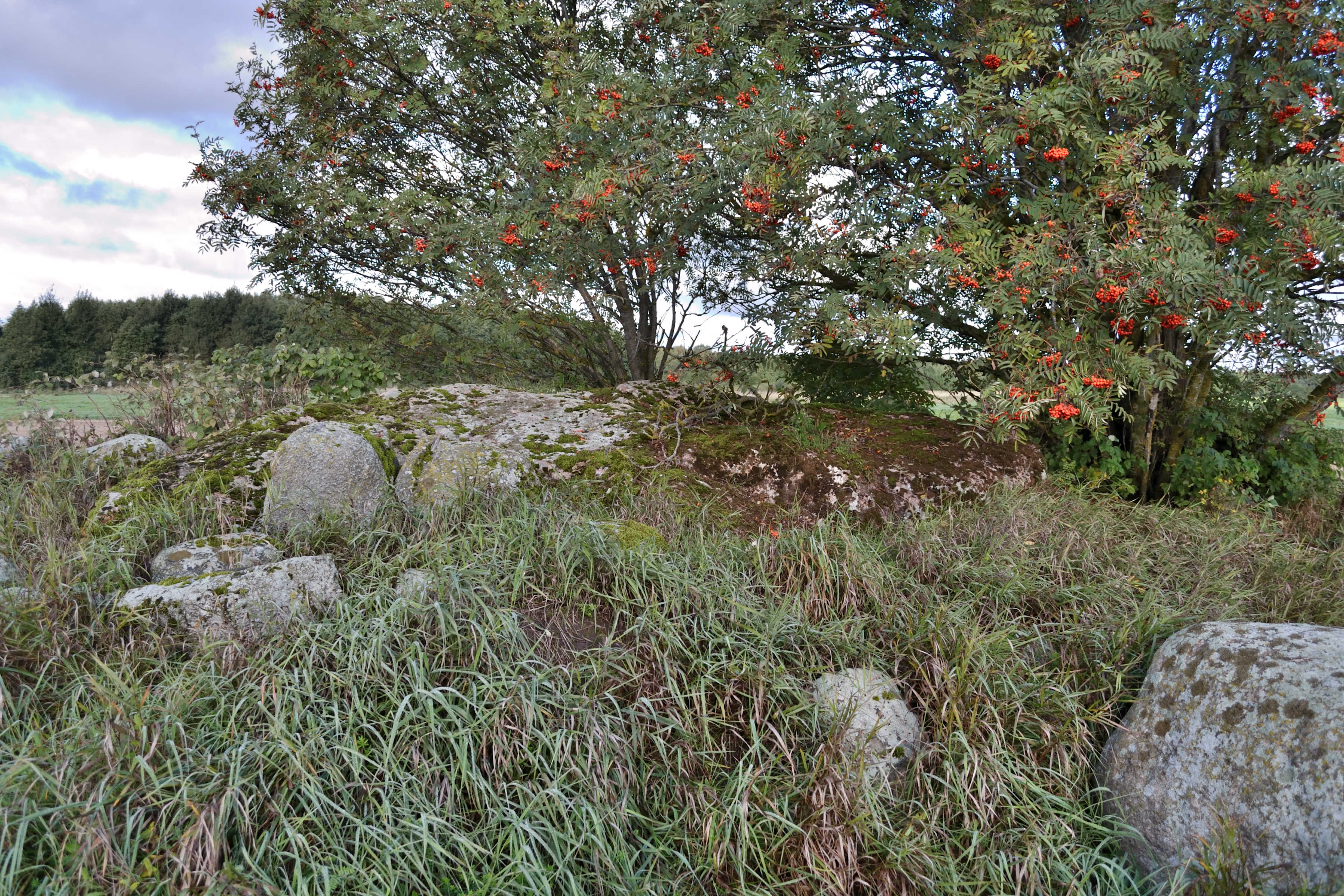 Kultusekivi, Saue vald, Alliku küla Suurekivi 1